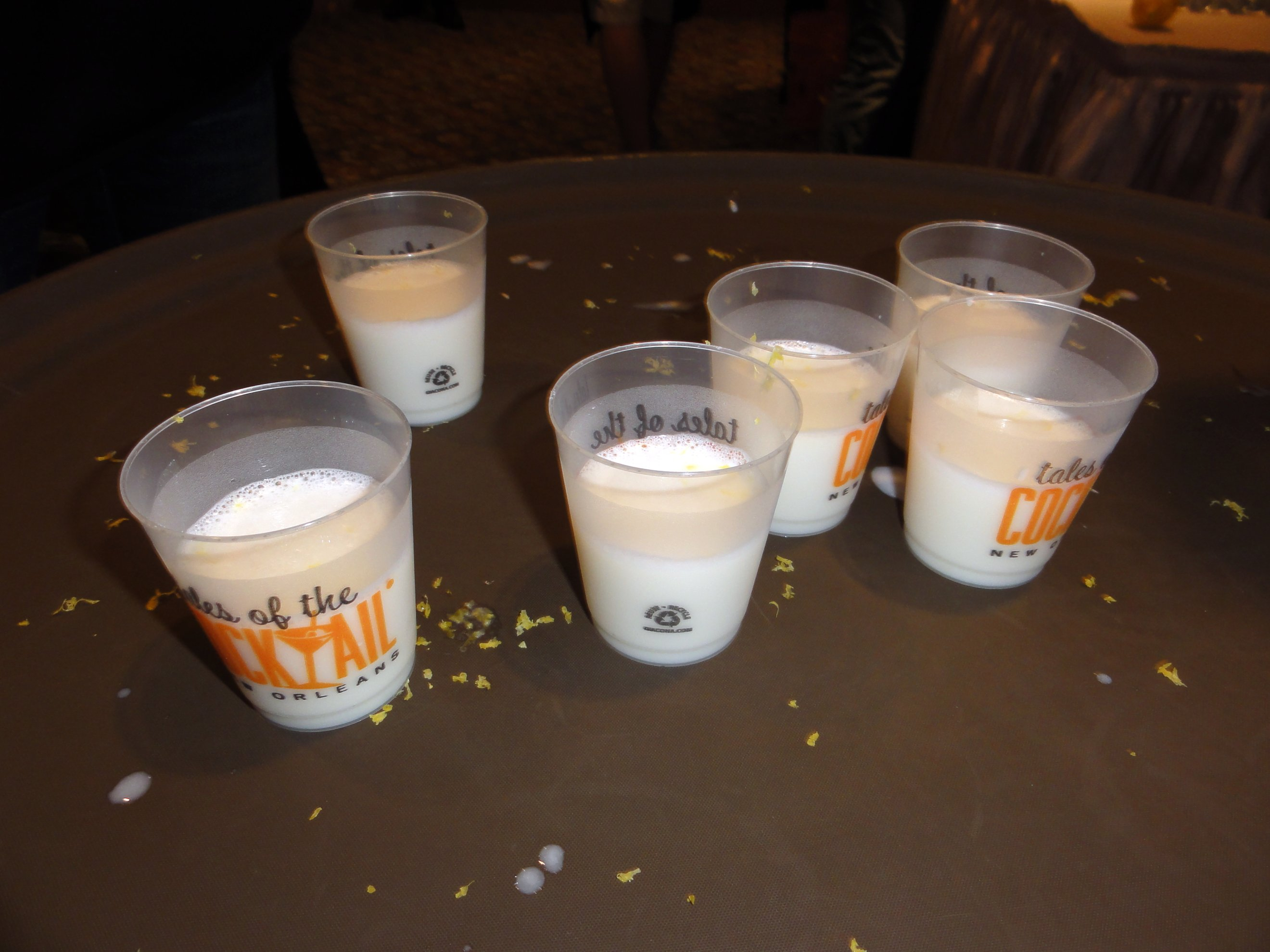 Pineapple syllabub